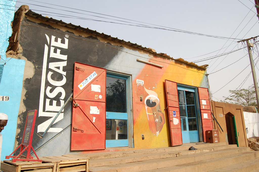 Nescafé ist sehr beliebt.